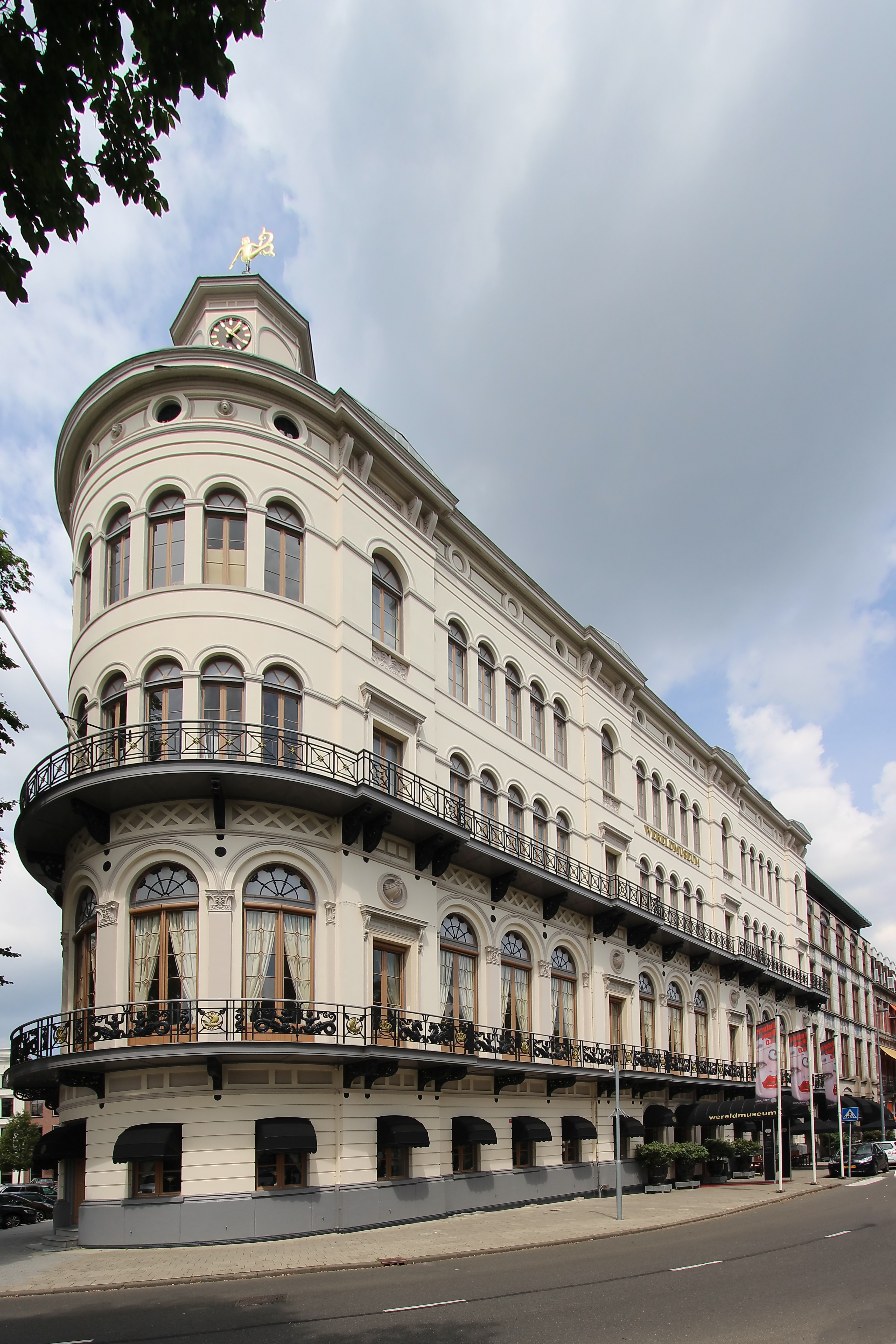 wereldmuseum rotterdam surroundings (13)